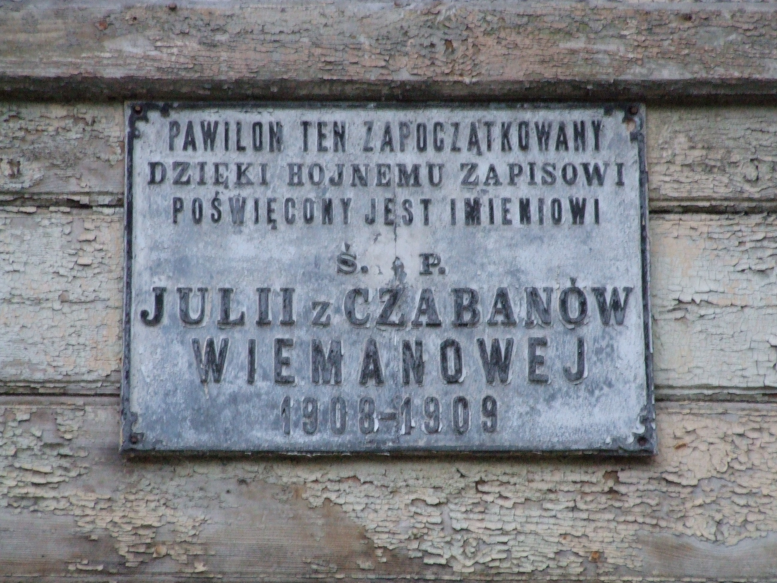 Wojewódzki Szpital dla Nerowowo i Psychicznie Chorych "Drewnica". Tablica Pamiątkowa